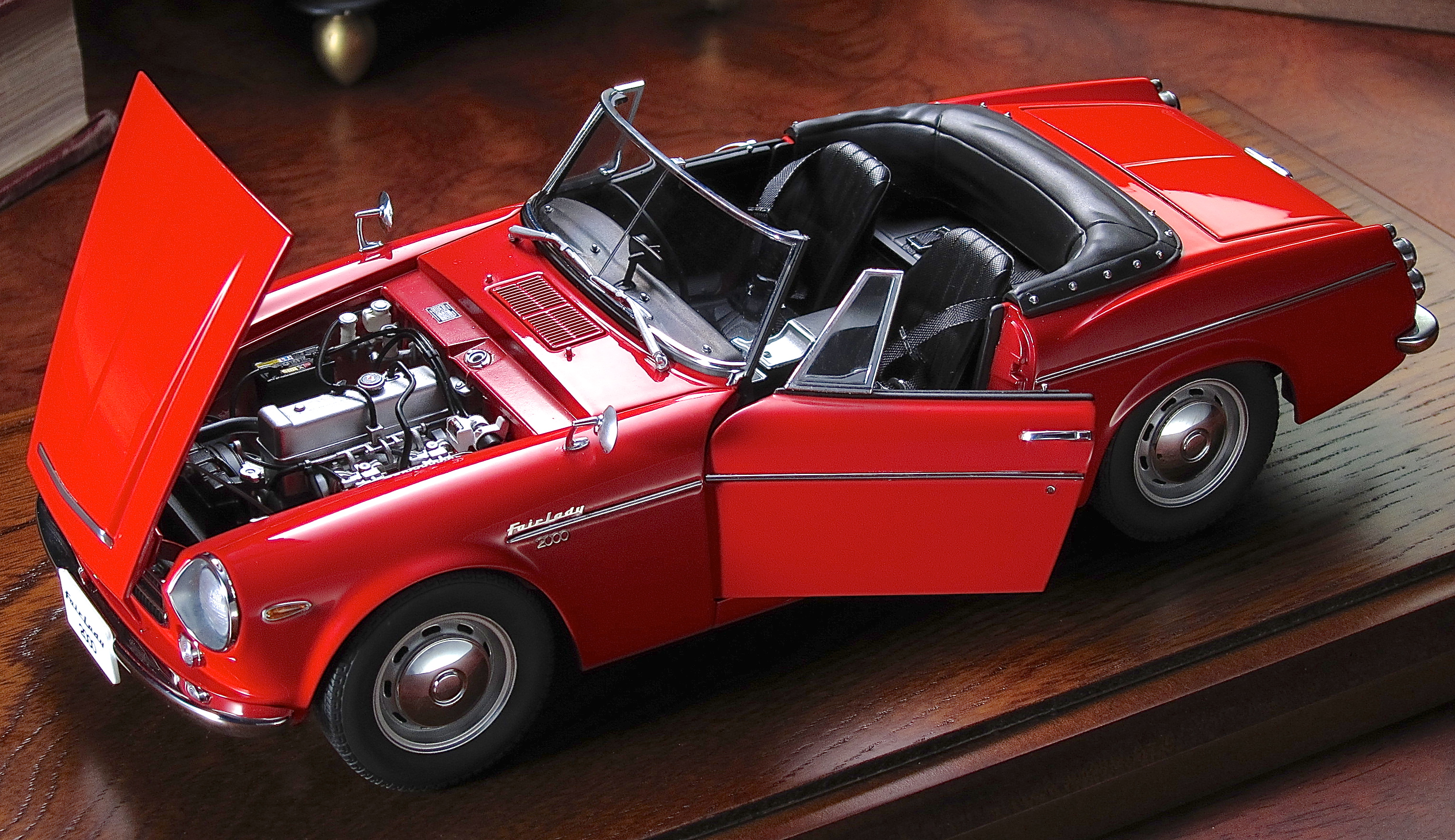 Datsun Fairlady 2000-modell